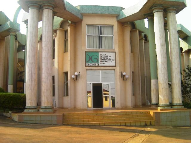 Facade d'entrée au campus Casablanca du Groupe ISCAE